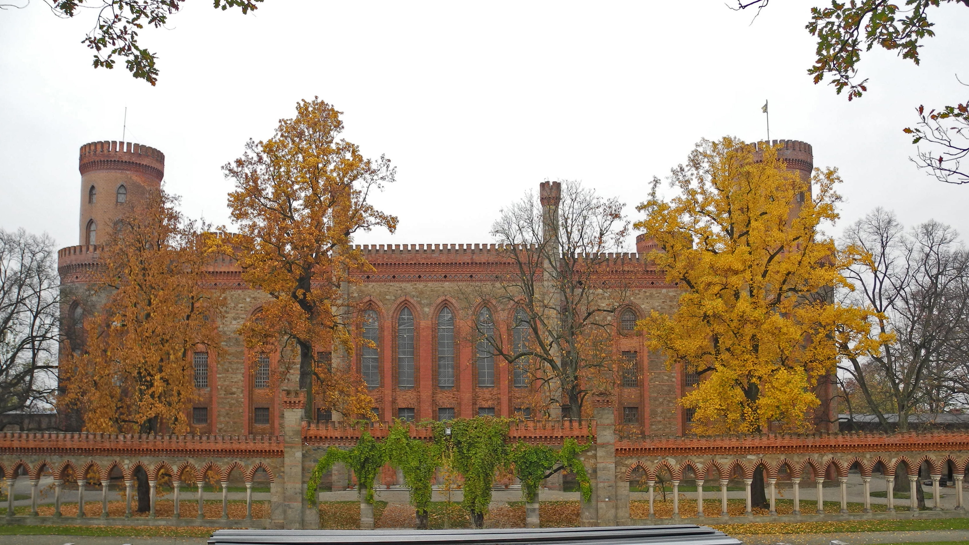 Schloss Kamenz in Niederschlesien (Kamieniec Ząbkowicki)